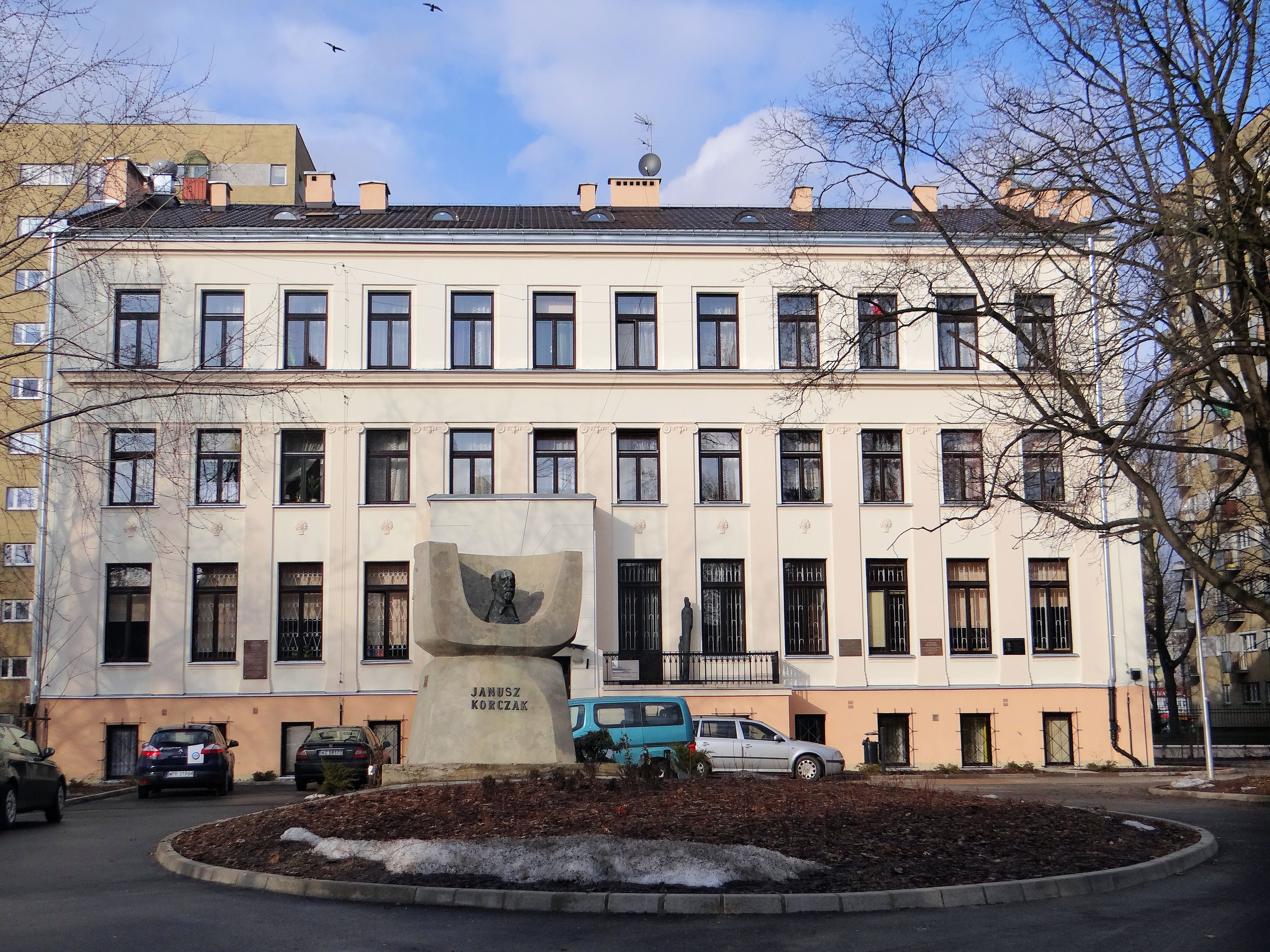 Korczakowski sierociniec przy ul Jaktorowskiej 6 (dawniej Krochmalnej) w Warszawie (elewacja południowa)